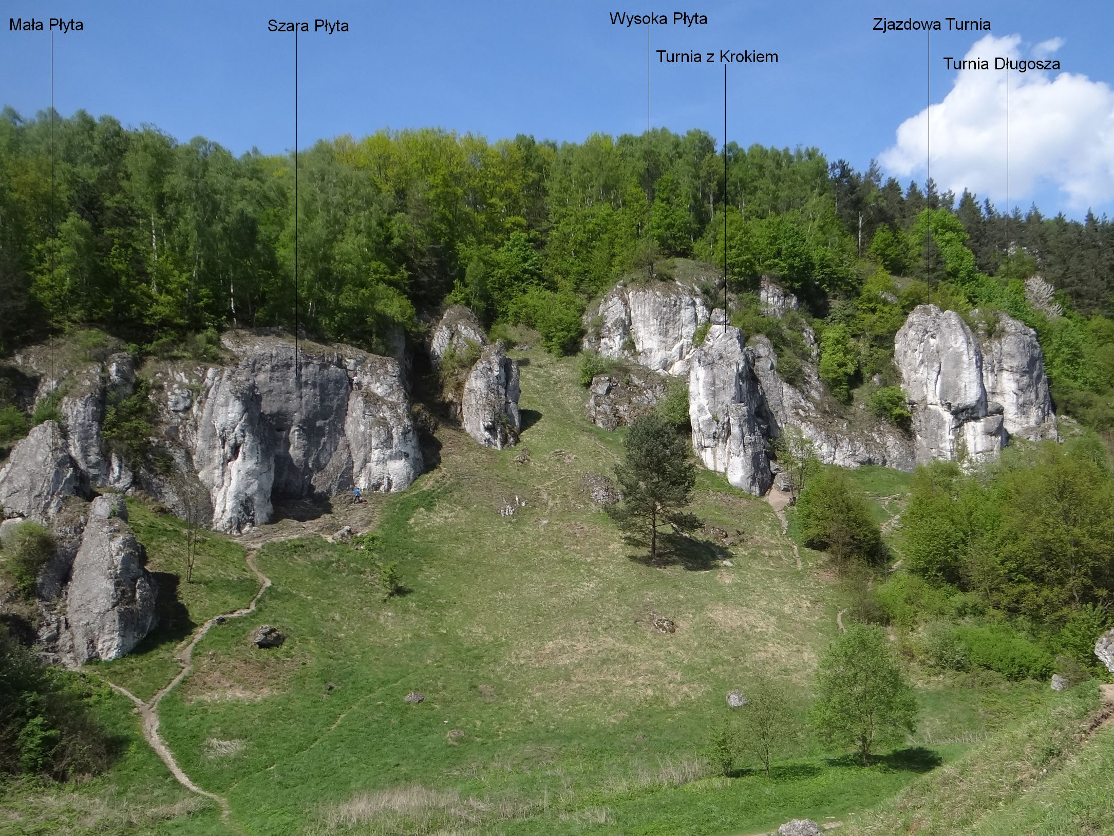 Grupa Zjazdowej Turni w Dolinie Kobylańskiej